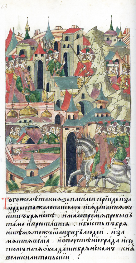 ЛИЦЕВОЙ ЛЕТОПИСНЫЙ СВОД В том же году князь Василий пришел из Орды с пожалованием и сел на княжение в Брянске, и малое время там пробыв, преставился. И был в Брянске мятеж от лихих людей и смута великая, опустели города, и завладел Брянском великий князь Литовский.